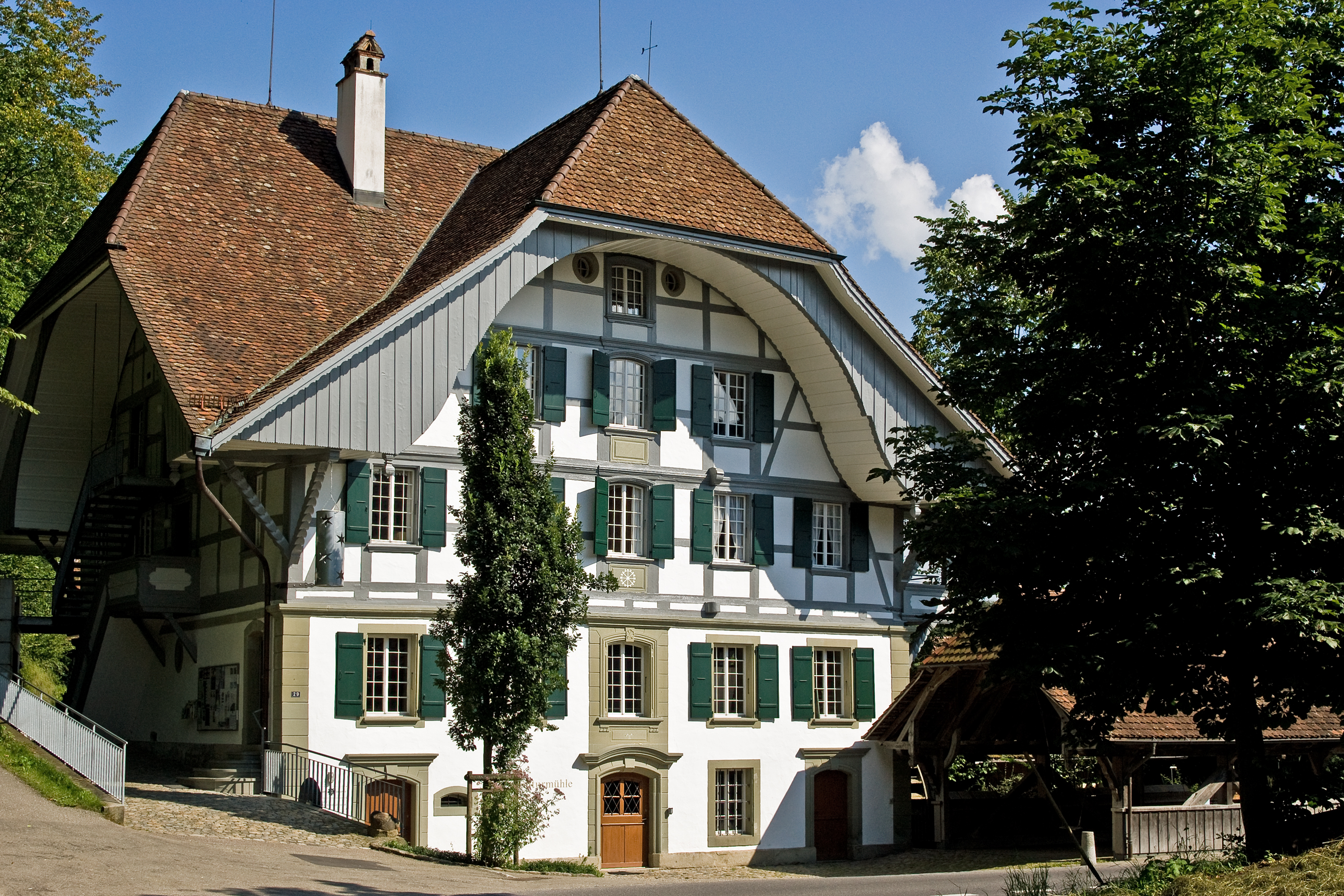 Kulturmühle Lützelflüh, eine einzigartige Kultur und Begegnungsstätte im Kt. Bern